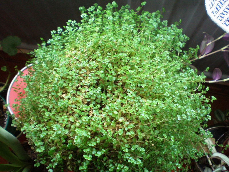 Soleirolia soleirolii